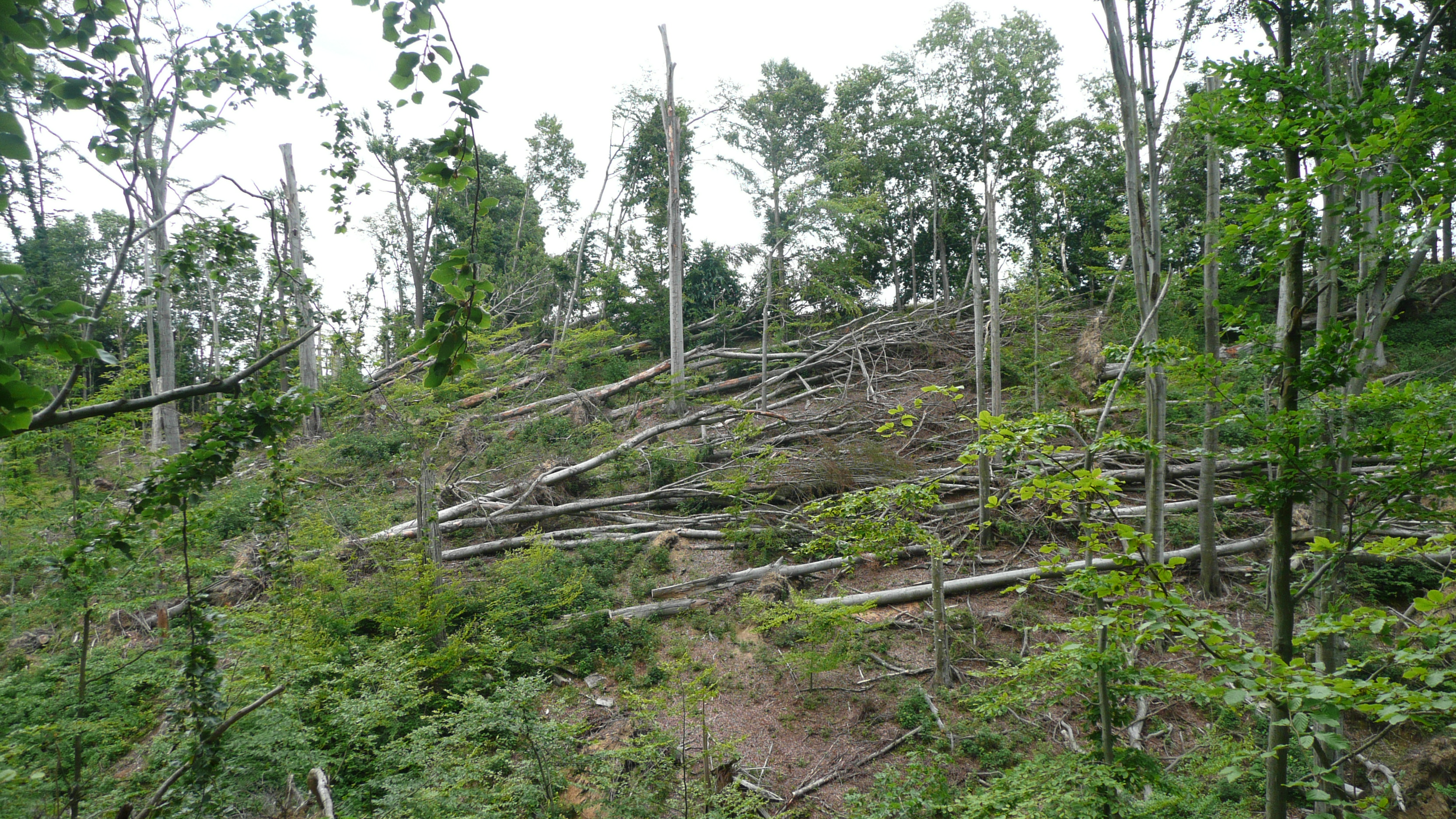 Tornado im Seifersdorfer Tal am 24.5.2010 - Ansicht vom 18.6.2011 nach den Aufräumarbeiten